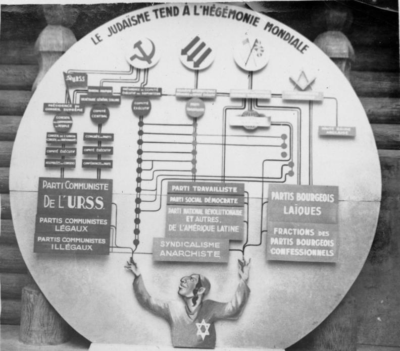 Frankreich, Antisemitismus, Ausstellung A l'Exposition antibolchevique N.P.M.: Un des panneaux de l'Exposition montrant-:-:-:-la tendance du judaisme á l'hégémonie mondiale. (Parno) Agence Fulgur 10.3.1942 [Herausgabdatum]